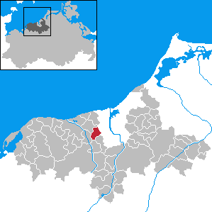 Lambrechtshagen in Mecklenburg-Western Pomerania - District Bad Doberan